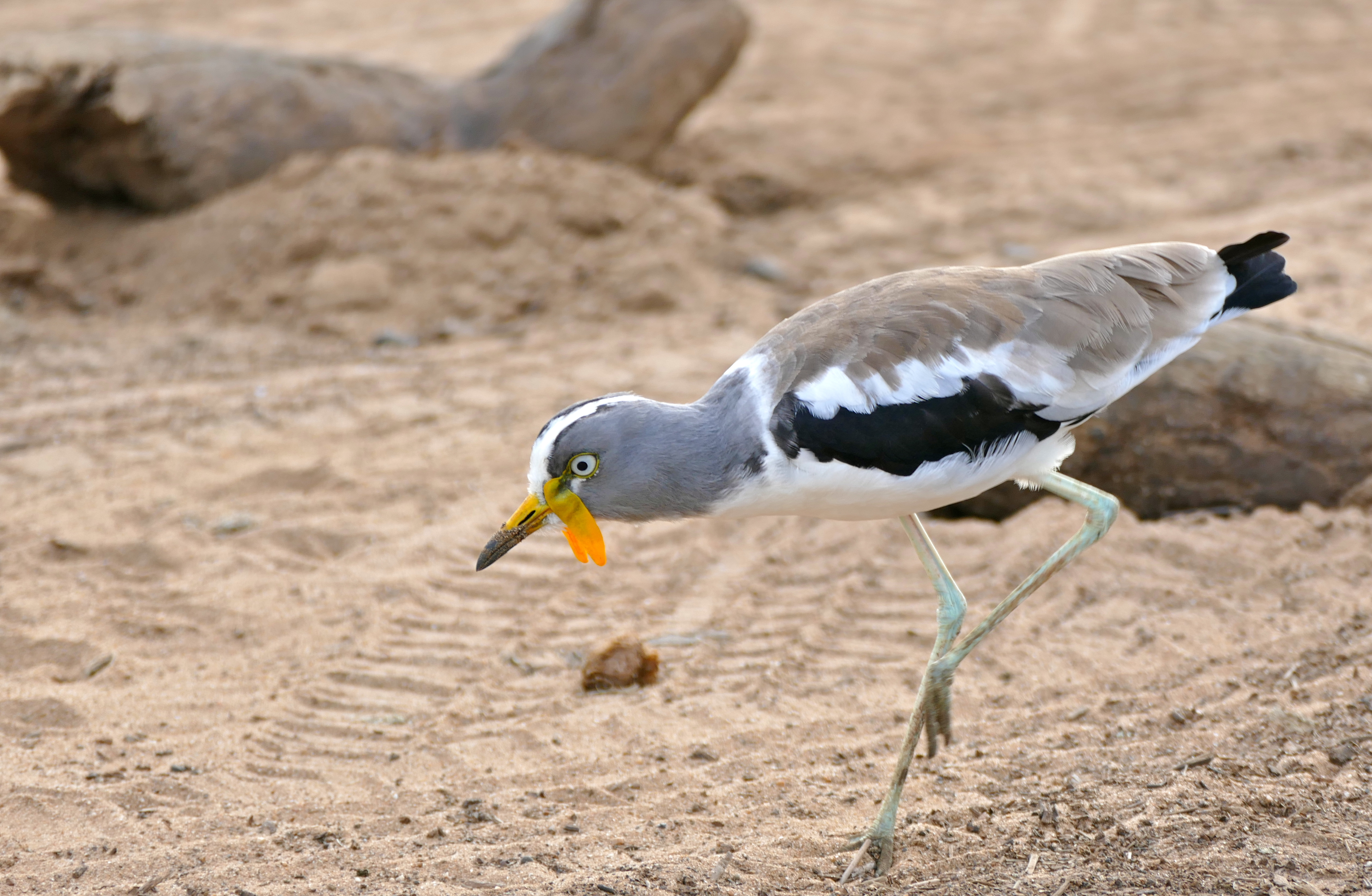 Sunset Dam, Lower Sabie, Kruger NP, SOUTH AFRICA